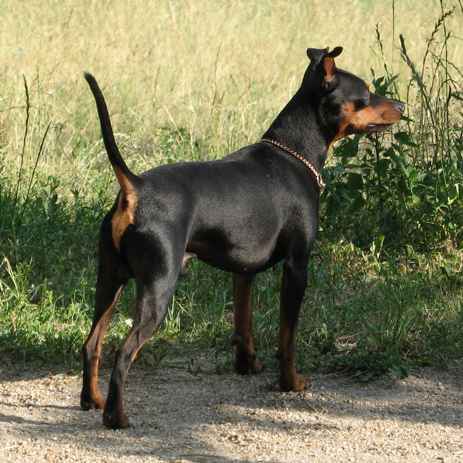 Zwergpinscher, Rüde in schwarz-rot. Zierlich, 4,1 kg. In Deutschland ist das Coupieren von Rute und Ohren untersagt.